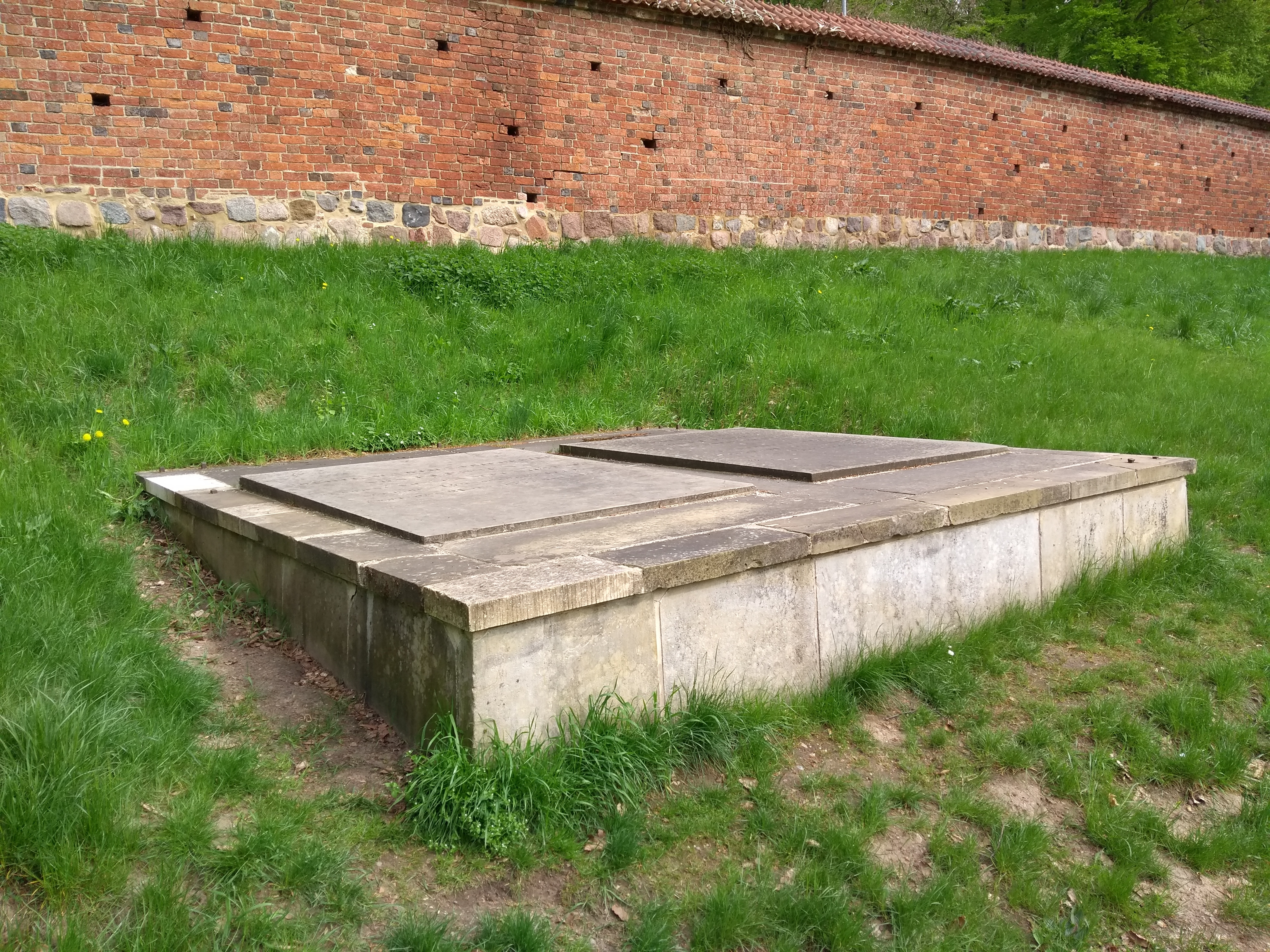 Bad Doberan Klosterfriedhof, Grabmal Plessen